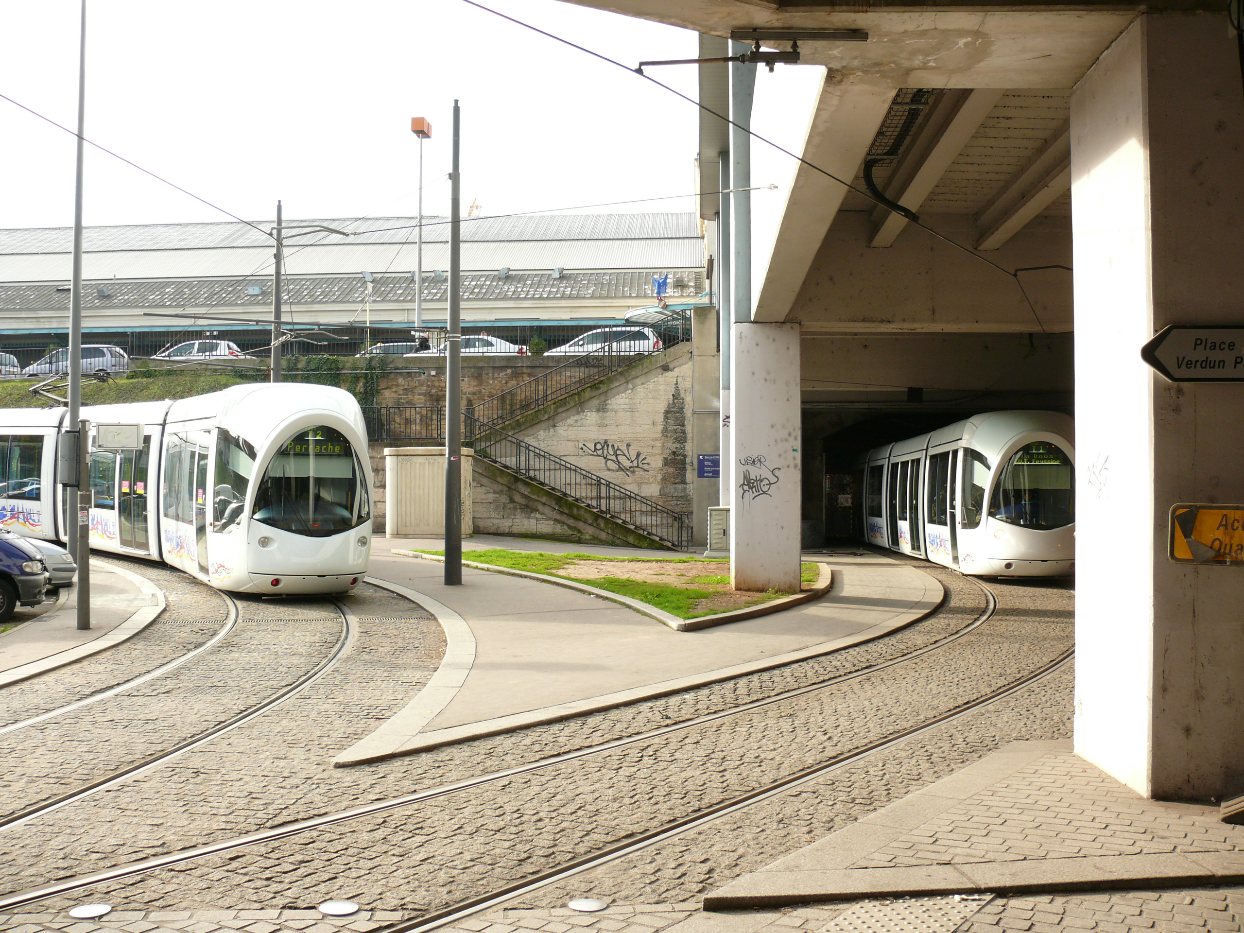 Tramway de Lyon : Installations d'arrière gare de la station Perrache, vues vers le sud. A droite, tramway de la ligne T1 venant de Montrochet, à gauche, tramway de la ligne T2 sur la voie de tiroir courbe de son terminus, au pied de la gare ferroviaire de Lyon-Perrache